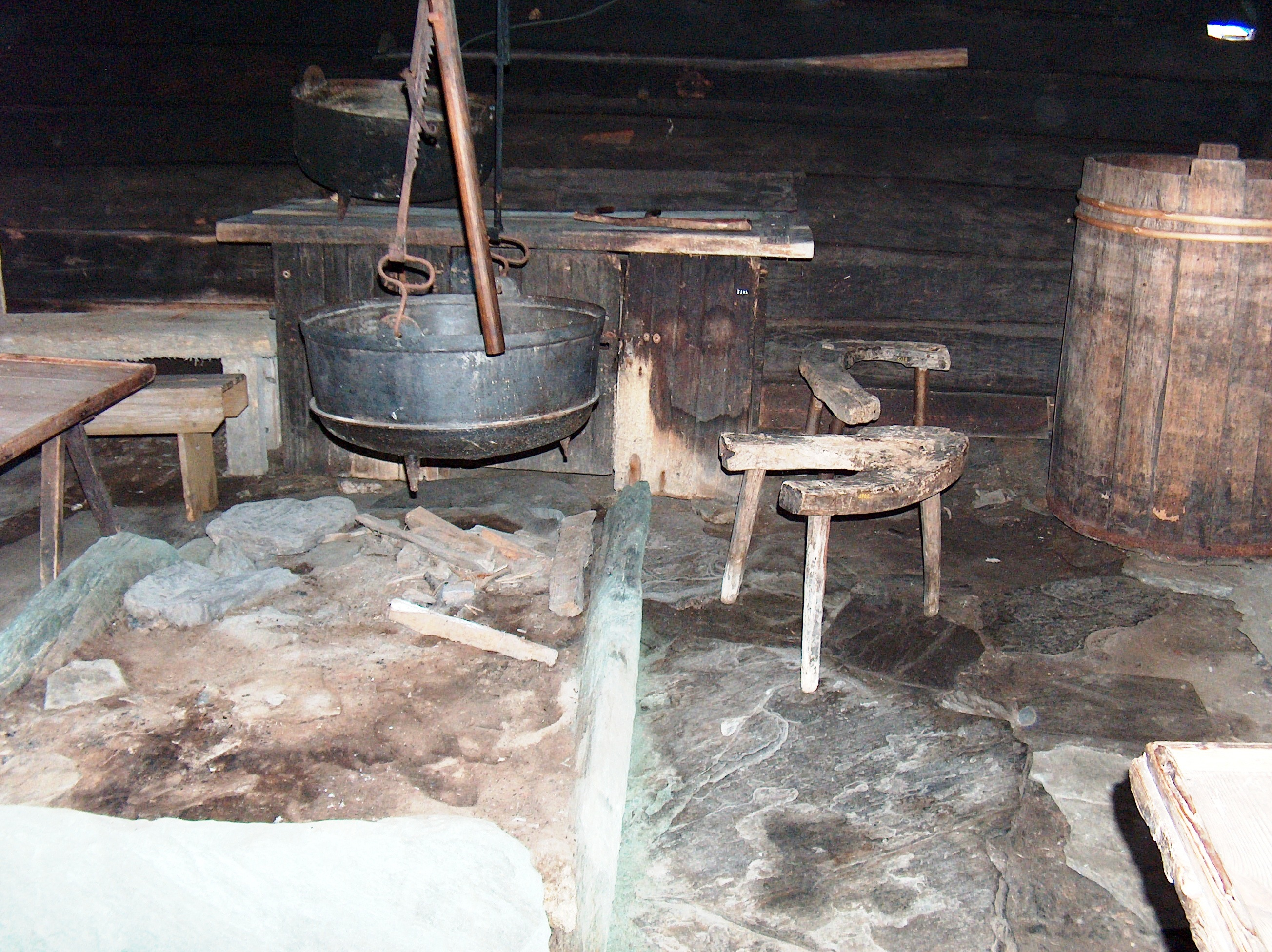 Mølstertunet inventar, Voss